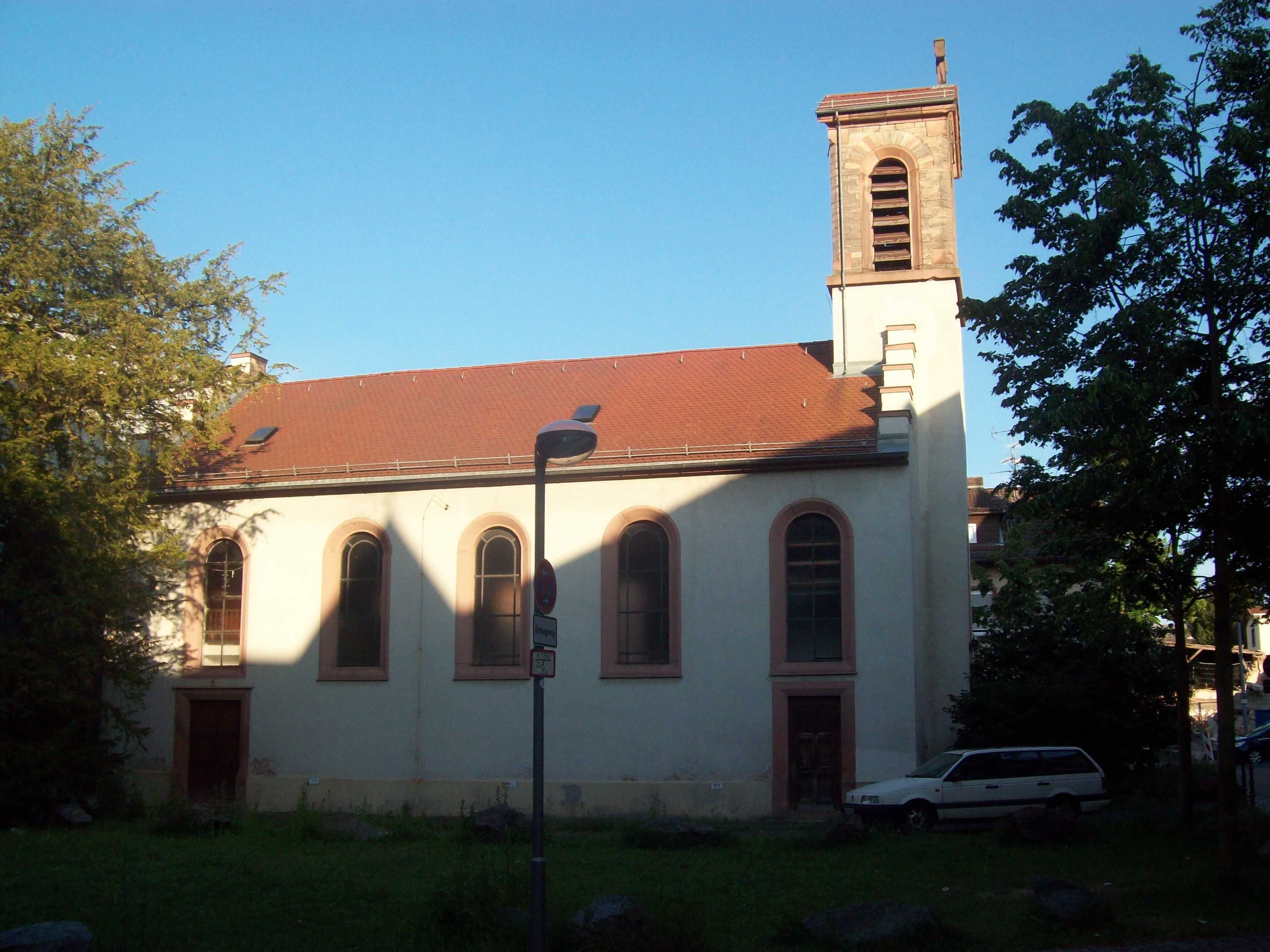 Spitalkirche St. Katharina am ehemaligen Städt. Krankenhaus -Hofseite